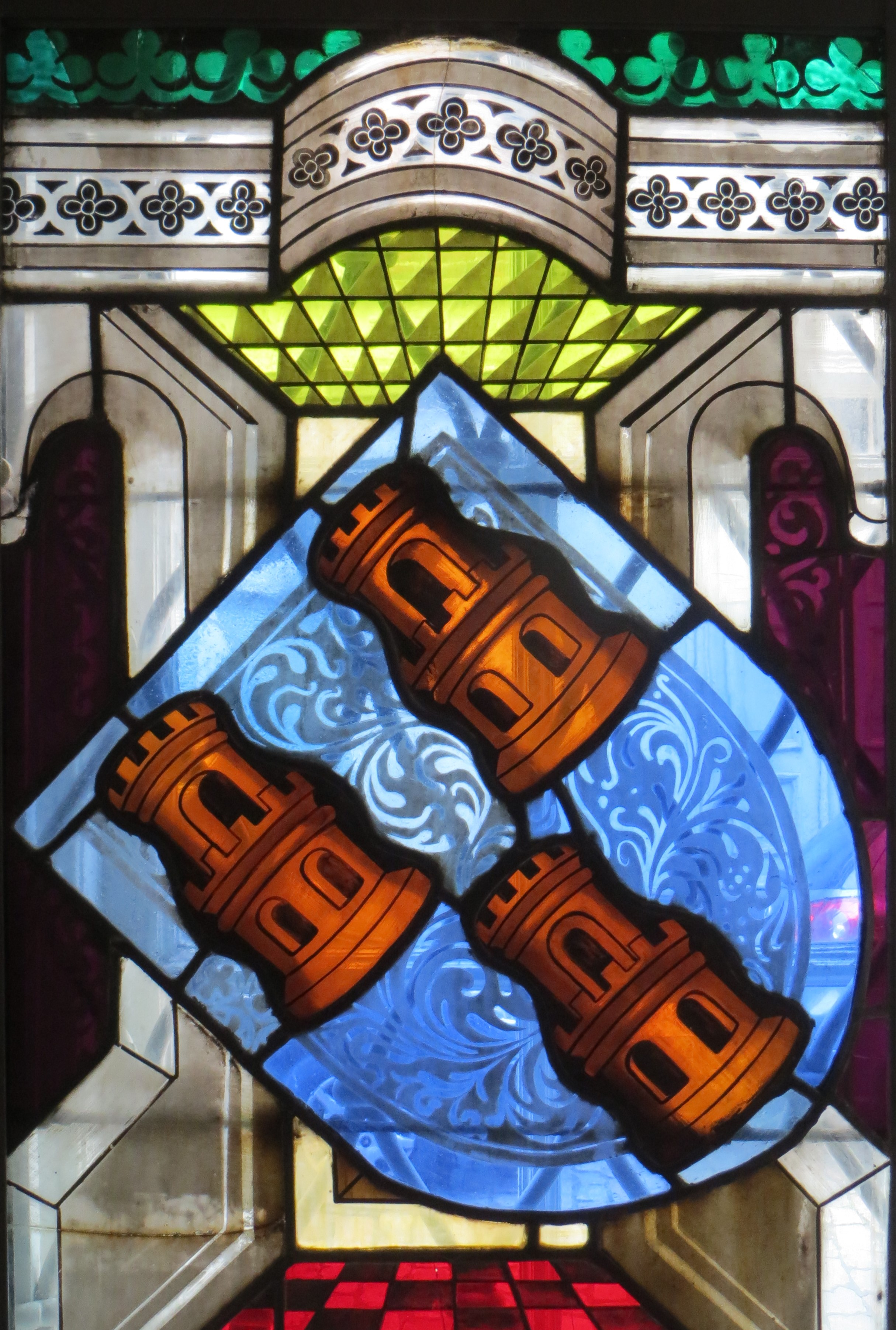 Glasfenster aus St. Katharinen im St.-Annen-Museum: Wappen des Johann Lüneburg (+ 1474)